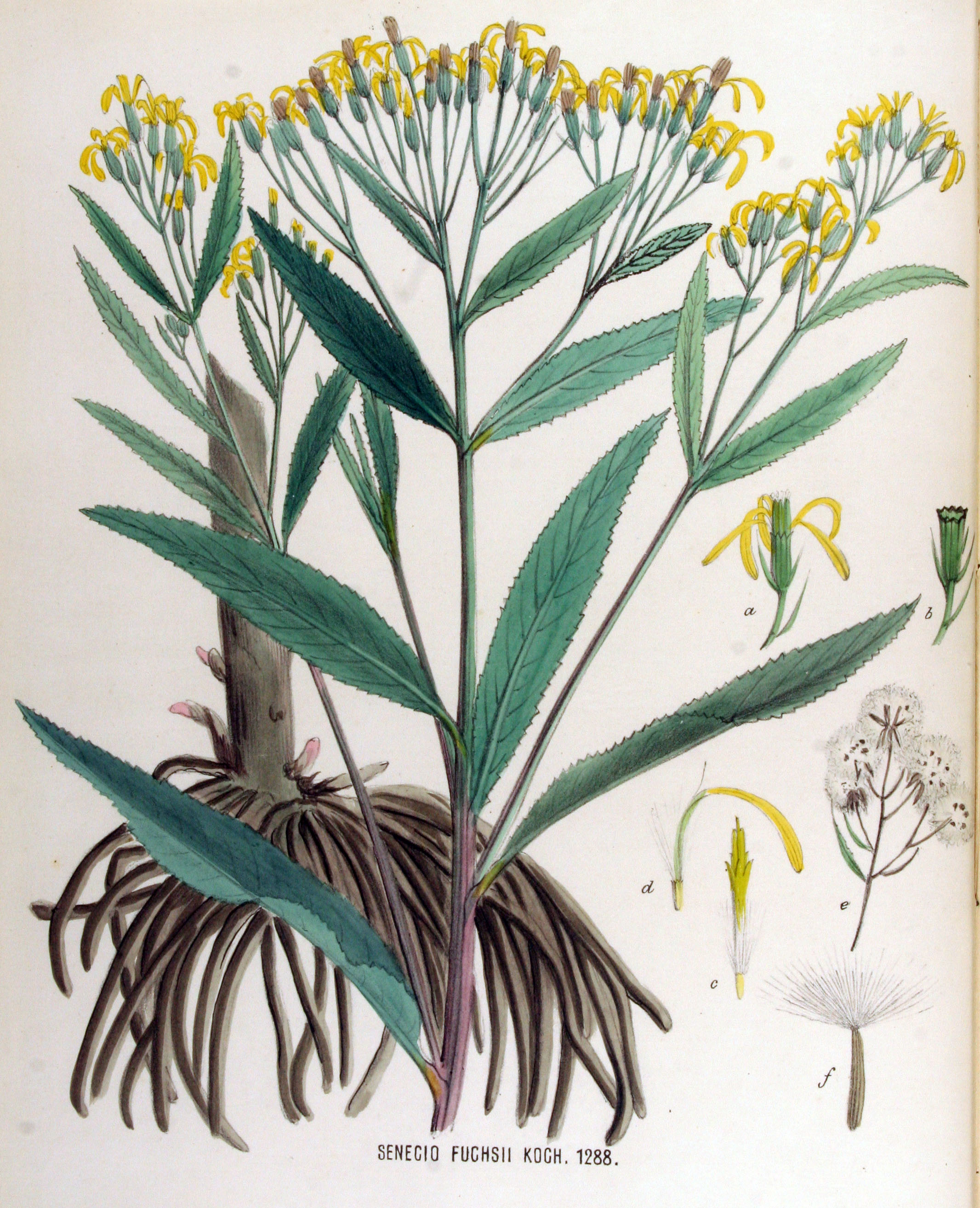 Senecio ovatus (P. Gaertn., B. Mey. & Scherb.) Willd. (Syn. Senecio fuchsii C.C. Gmel.)